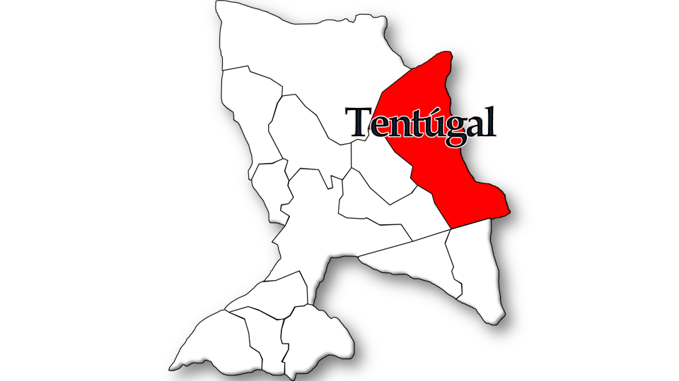 População